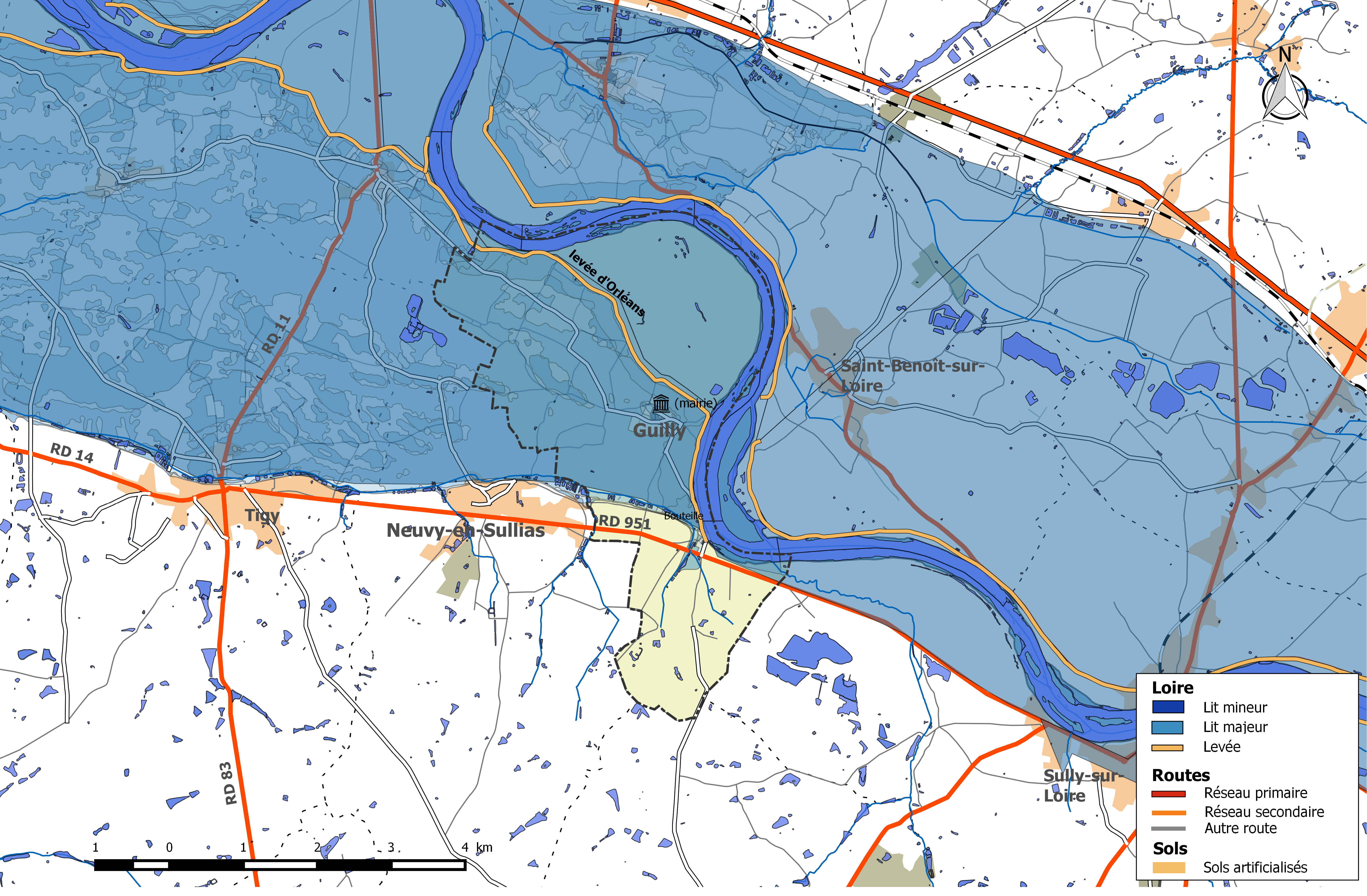 Zone inondable et réseaux hydrographique et routier de la commune de Guilly.